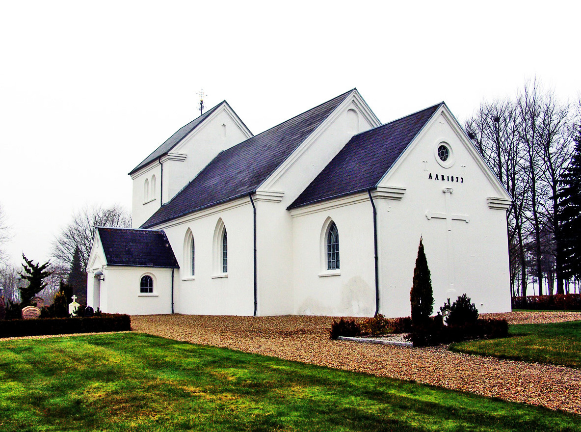 fra sydøst